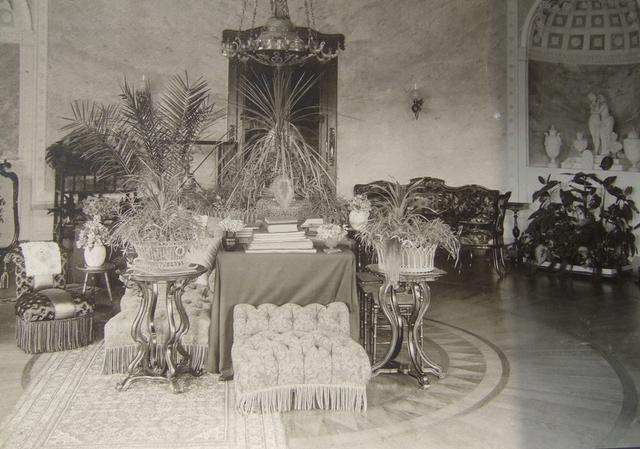 Интерьер усадьбы Зубриловка